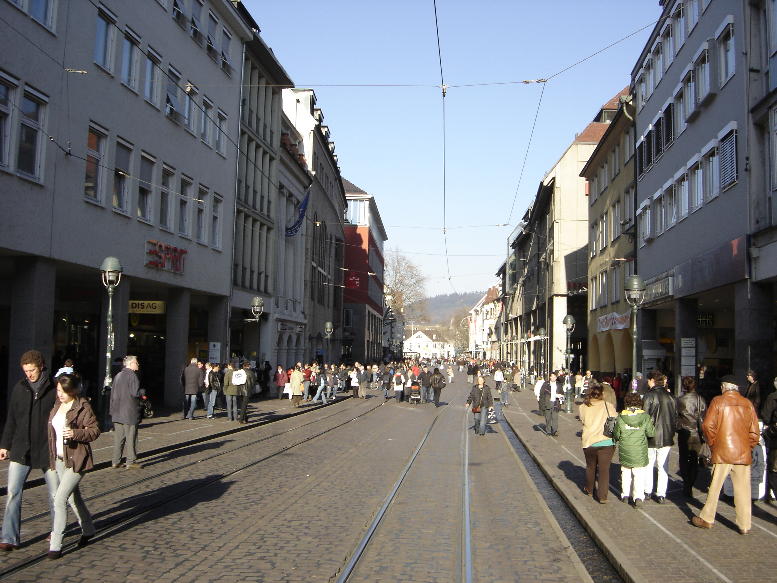 Die Kaiser Joseph-Straße Richtung Siegesdenkmal